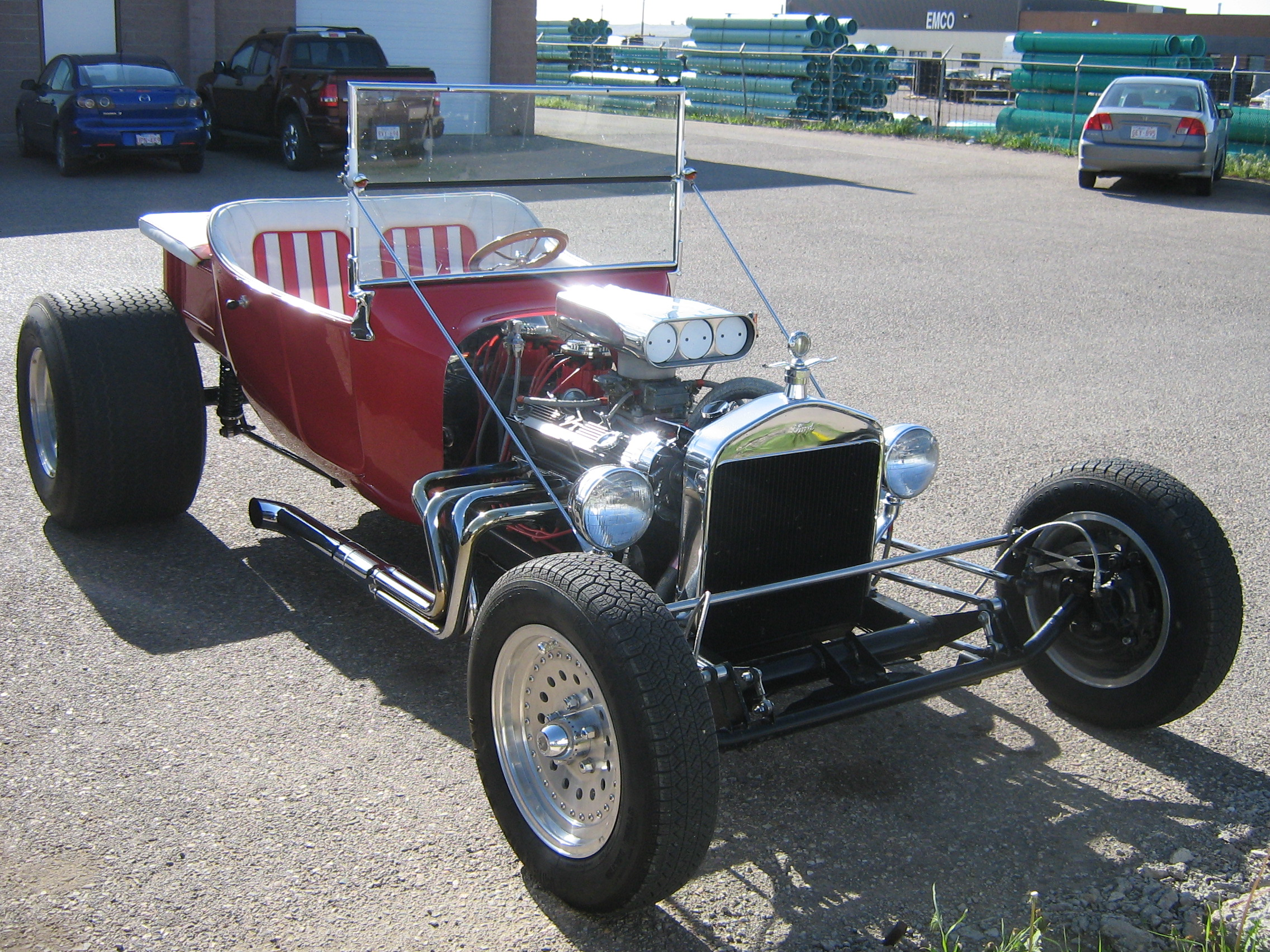 T-bucket